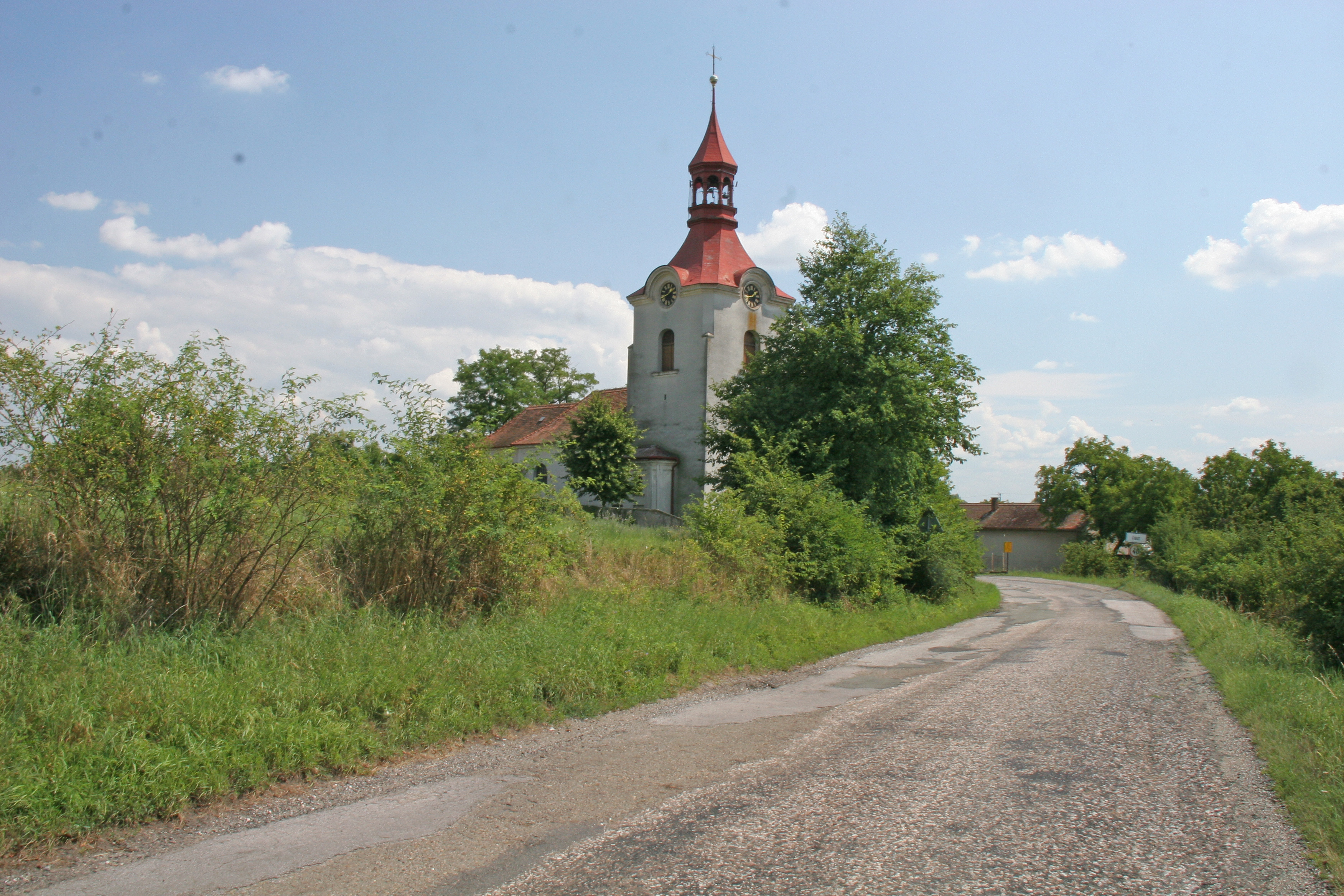 Kostel svatého Václava, Číbuz.